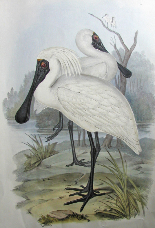 Royal Spoonbill Platalea regia. Māori name: Kōtuku ngutupapa